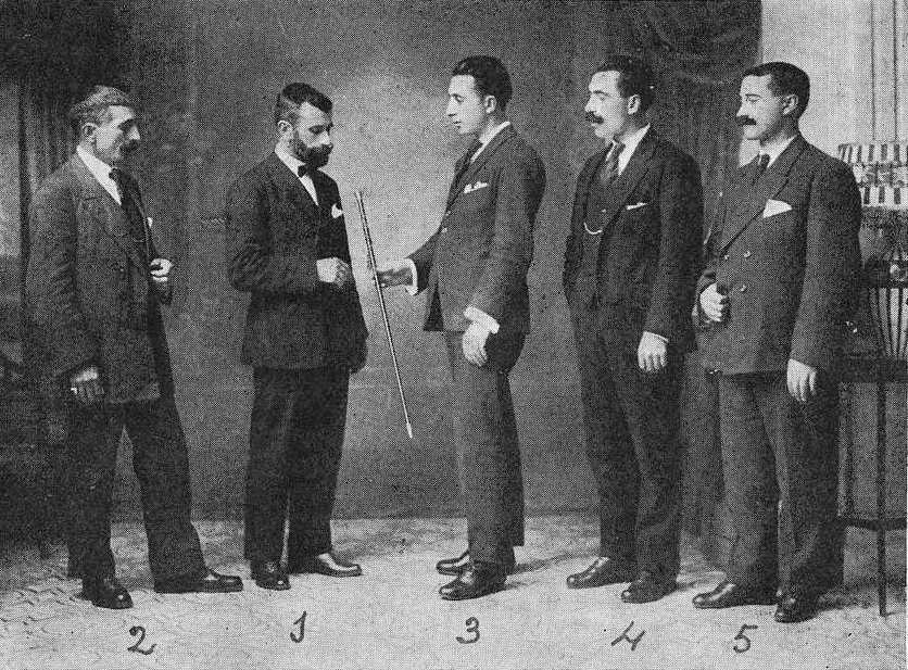 Gabriel Porto Neira (1) recibe o bastón de alcalde agasallo dos seus amigos: Antonio Iglesias do Campo (2), Ramiro Gómez (3), Secundino Fuentes Paz (4) e Ramón Ferreiro Folgar (5). Fotografía en Vida Gallega 1920